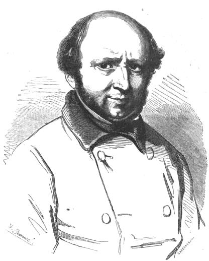 Luigi Persico